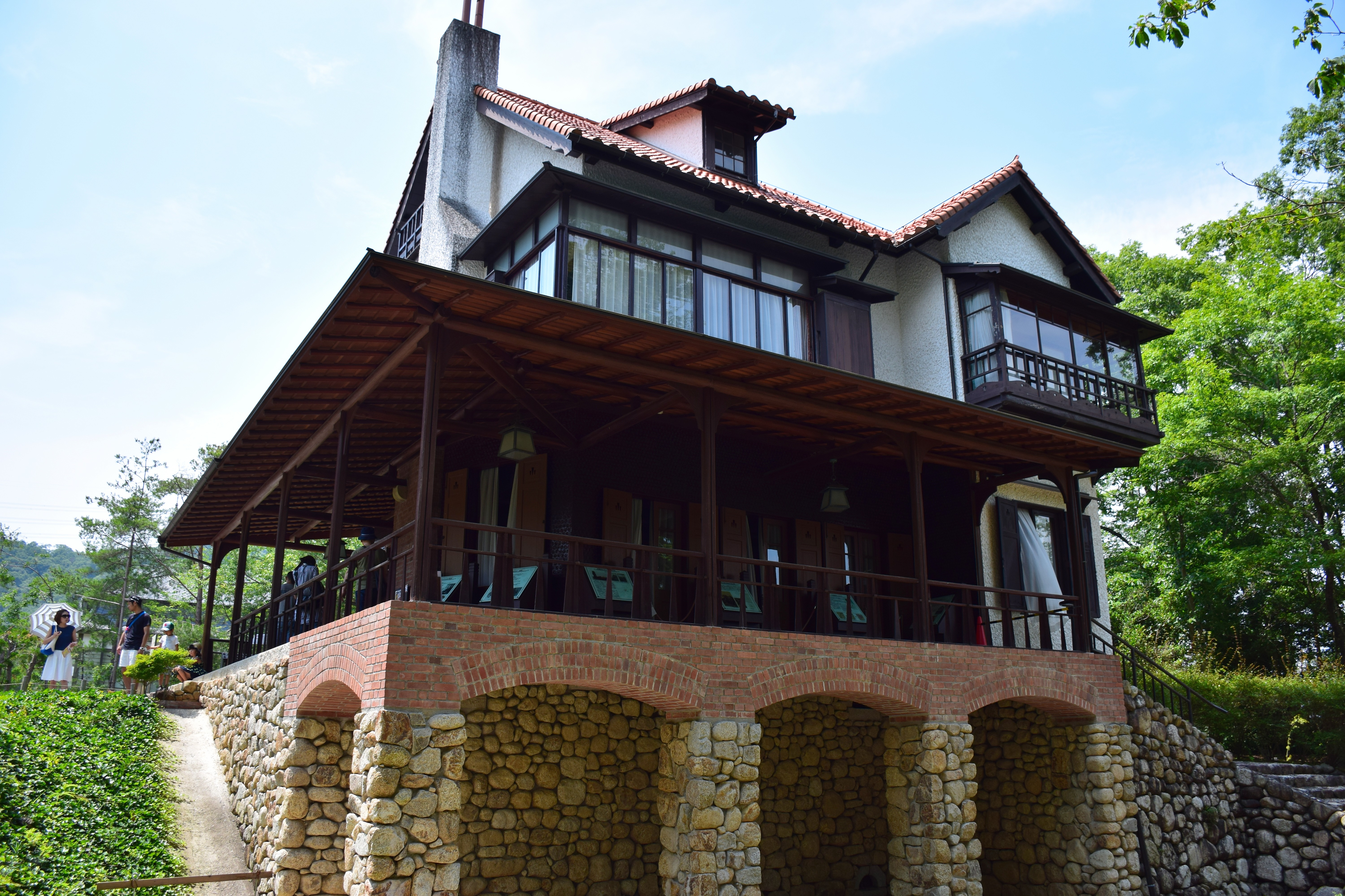 芝川又右衛門邸